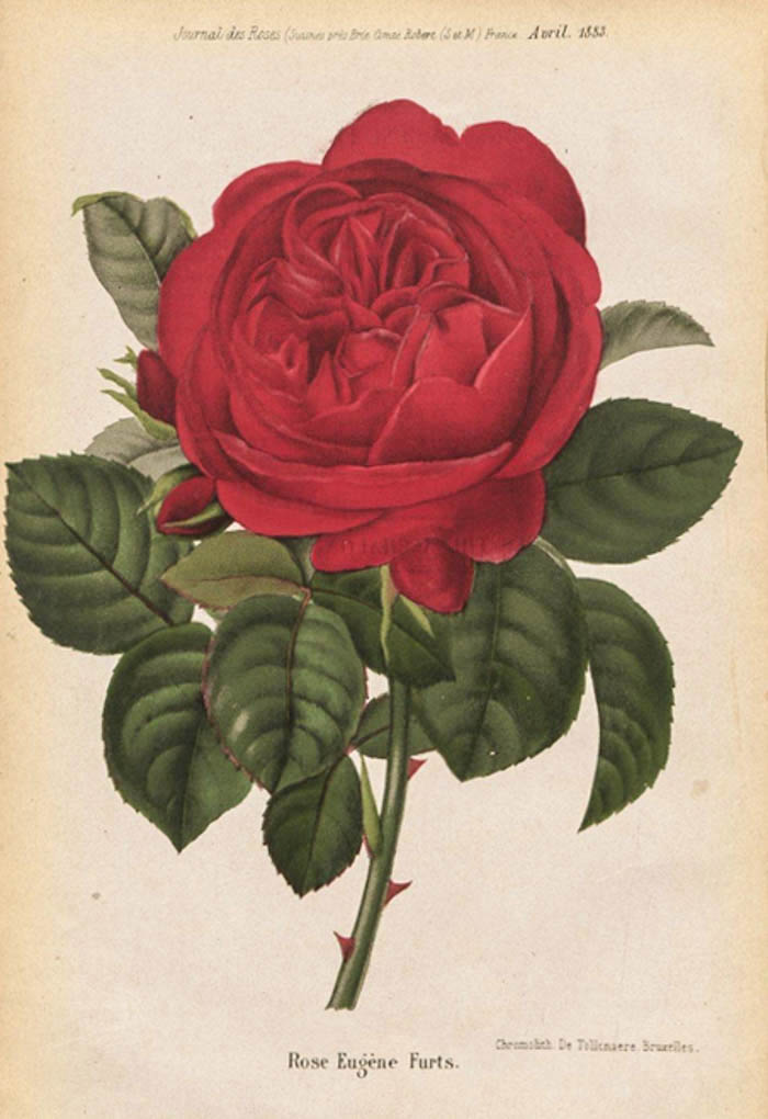 Rosier hybride remontant 'Eugène Fürst' (Soupert & Notting, 1875), illustration dans le Journal des roses d'avril 1883.